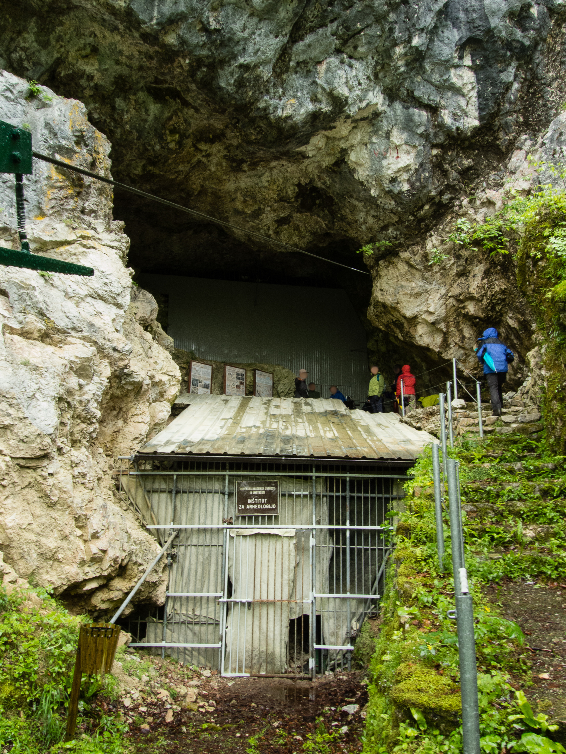 Eingang zur Höhle Divje Babe I bei Šebrelje, Idrija, Slowenien.